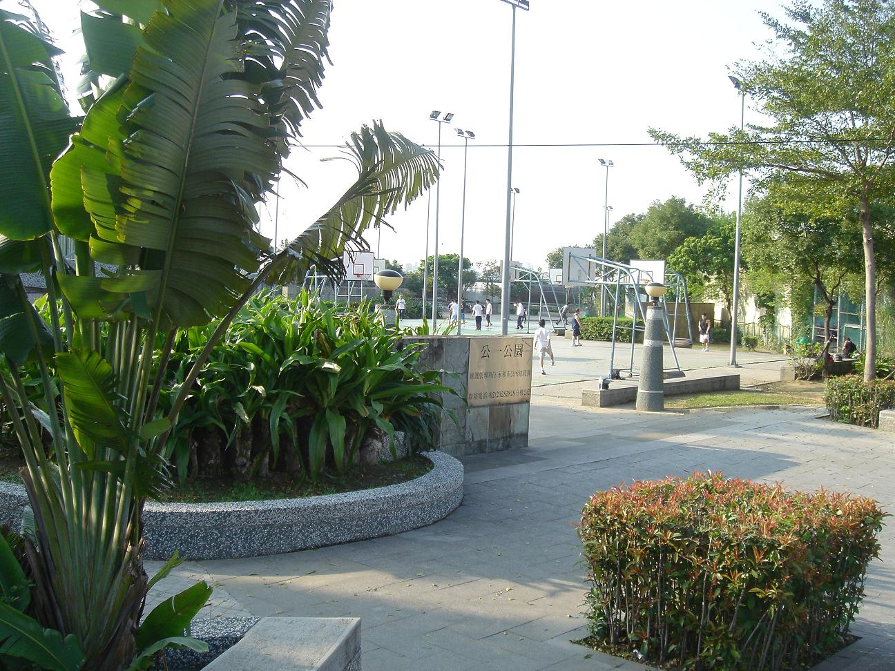 新北市永和區公一公園。